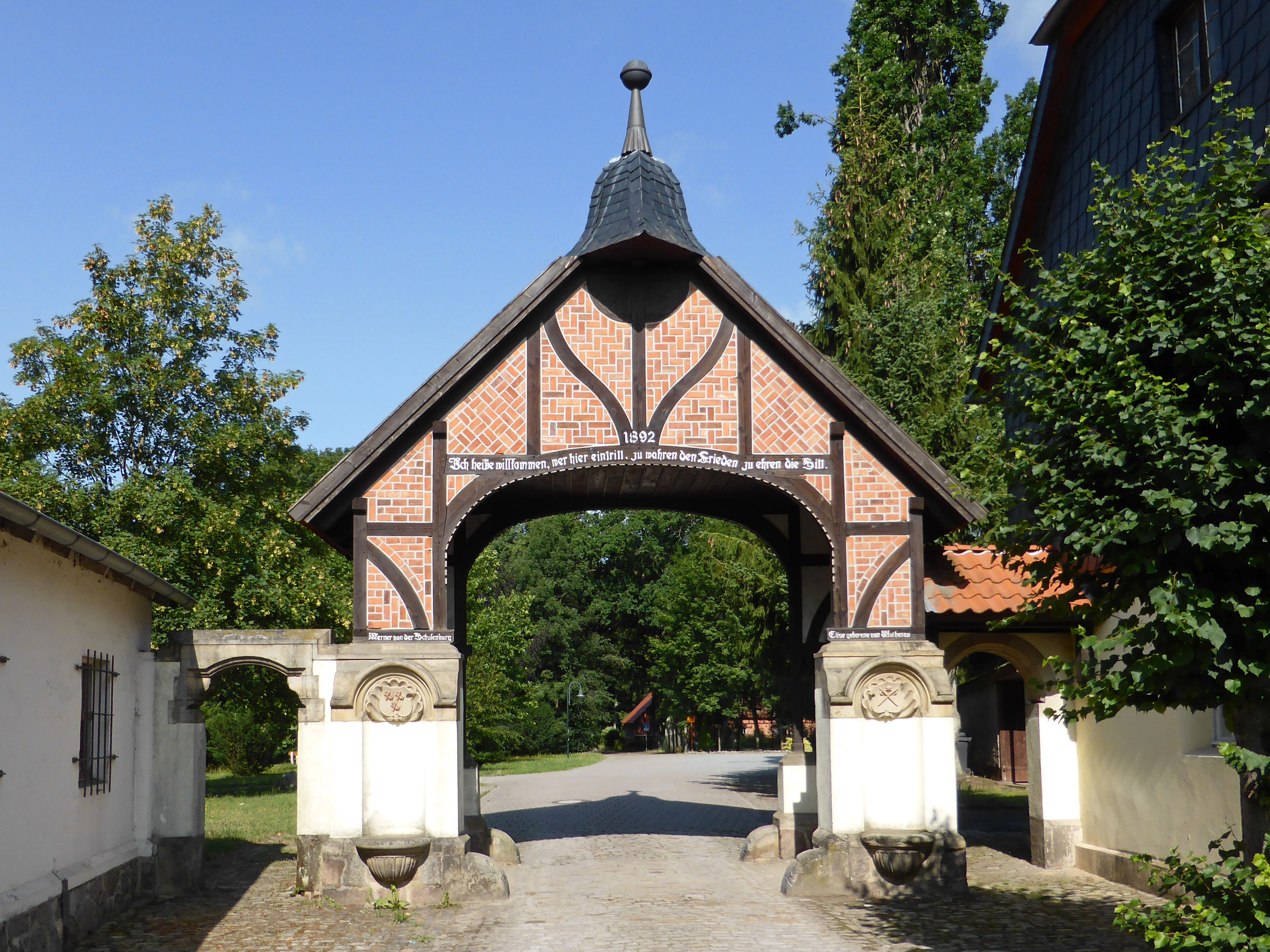 Eingangstor zum Apenburger Hof in Beetzendorf von 1892 mit Inschriften und Wappen von Werner von der Schulenburg (1841-1913) und seiner Ehefrau Elise geborene von Wuthenau (1856-1941).